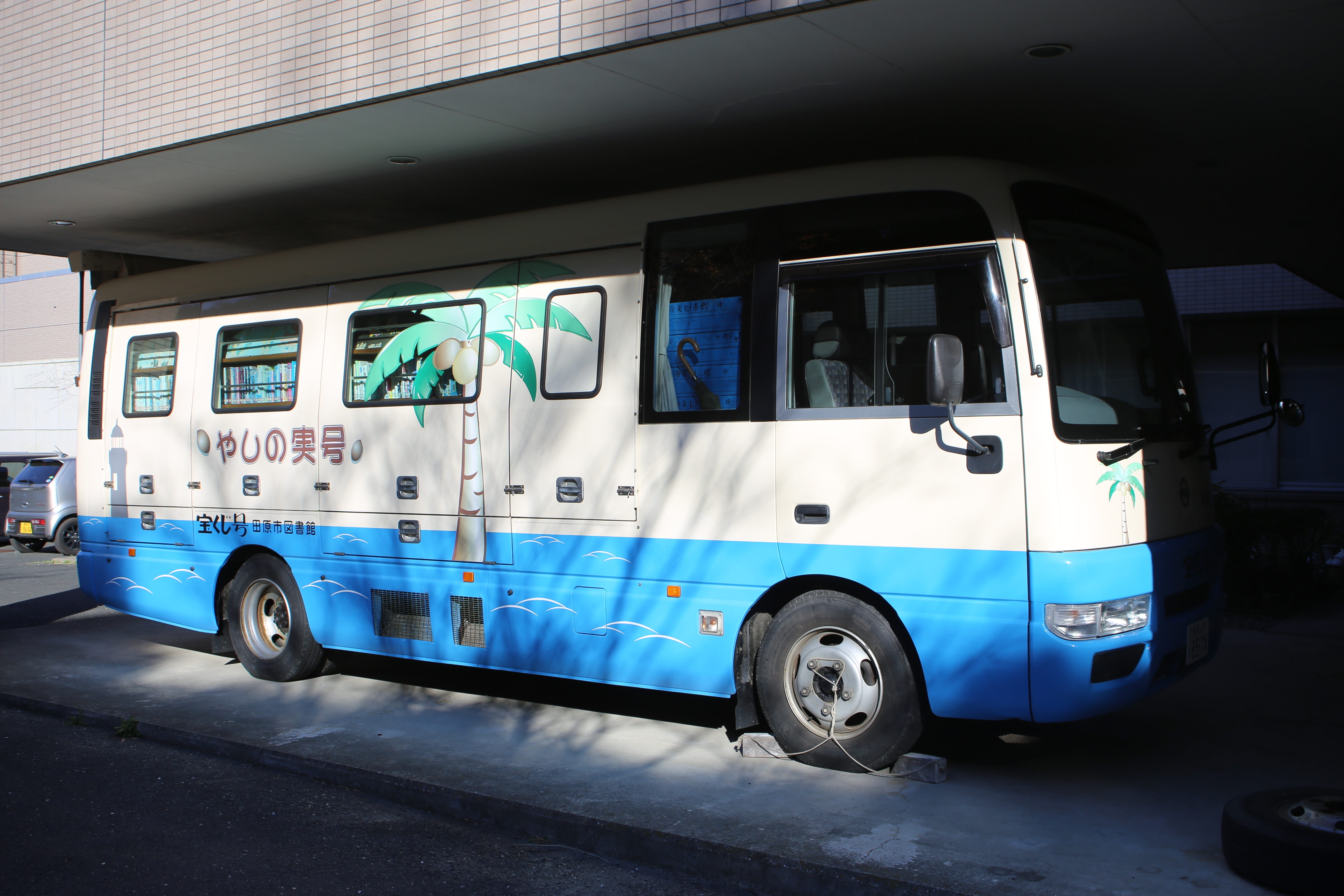 愛知県田原市古田町の田原市渥美図書館が保有する移動図書館車「やしの実号」